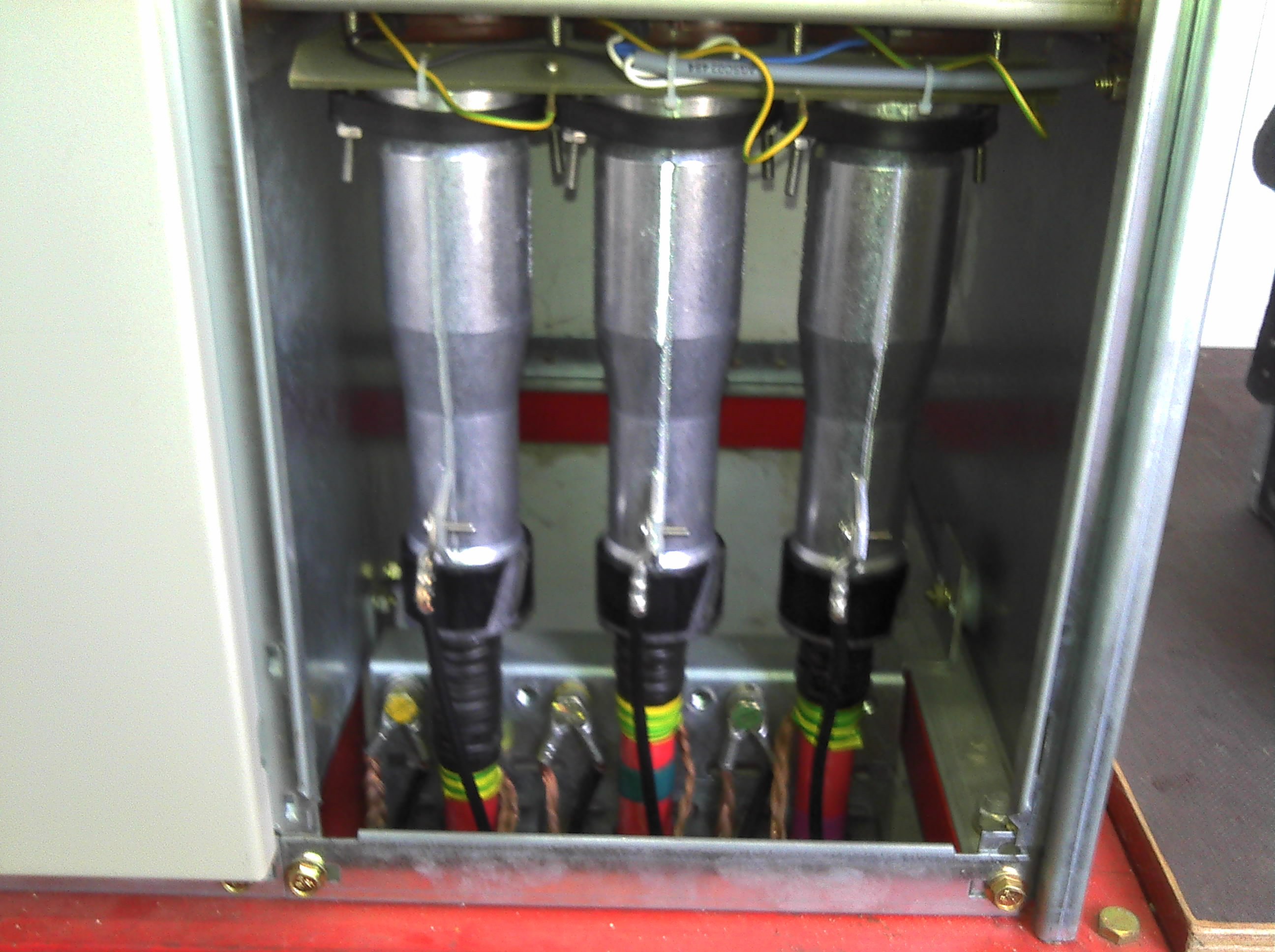 20 KV Endverschlüsse in gekapselter Bauweise